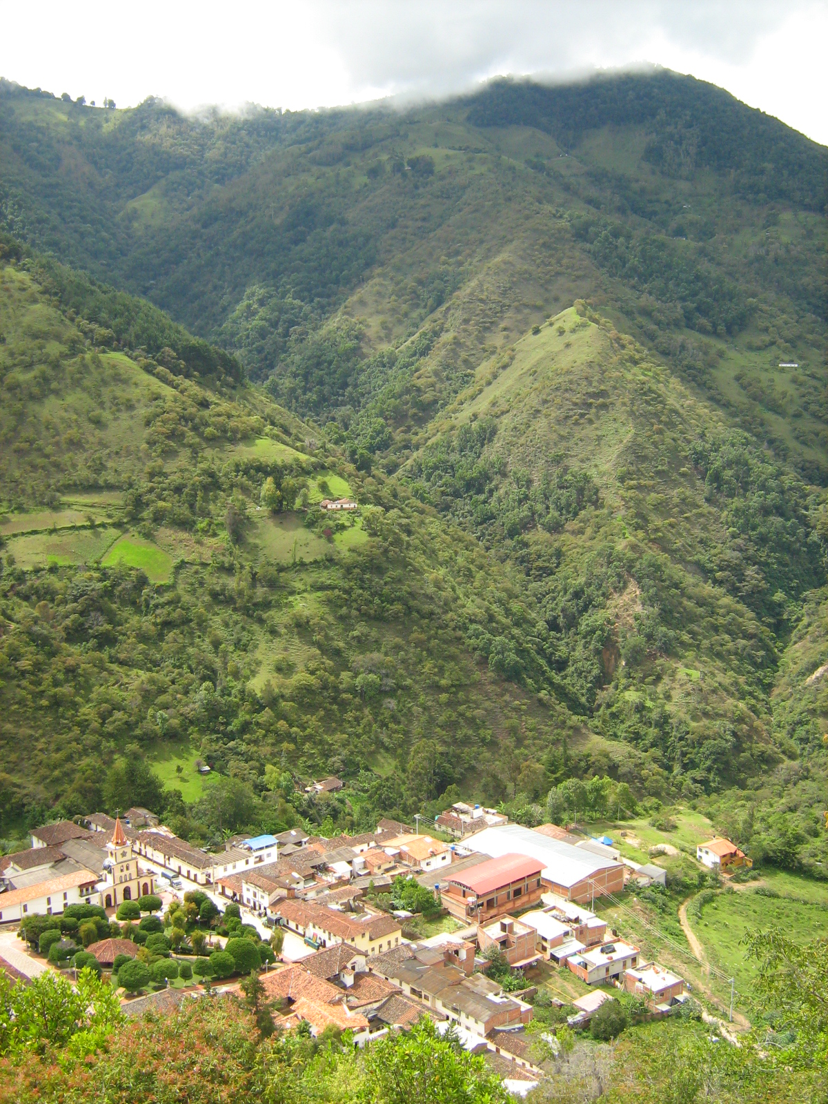 Panorámica de California, Santander